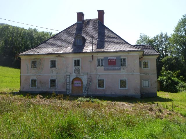 Schloss Guggenthal - heute